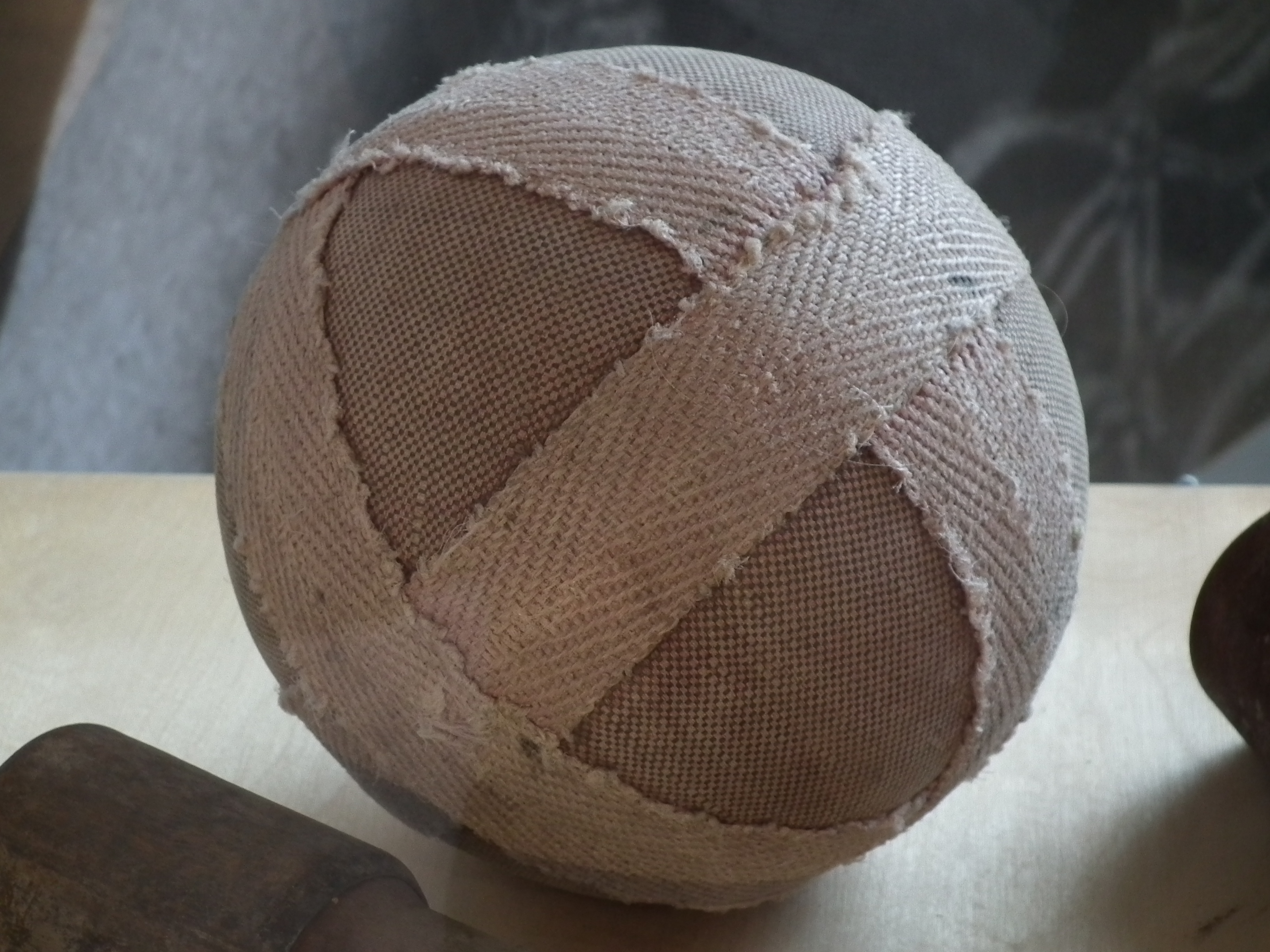 Dresden - Die Welt der DDR